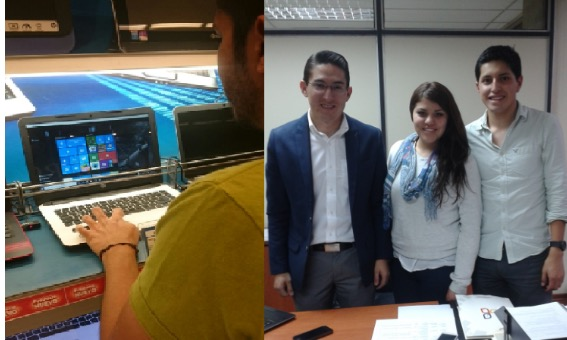 La imagen representa en el lado izquierdo un empresario con una cultura en la que es optima la comunicación por escrito utilizando medios tecnológicos. En el lado derecho se observa un grupo de empresarios que prefieren la comunicación personal para concretar una negociación